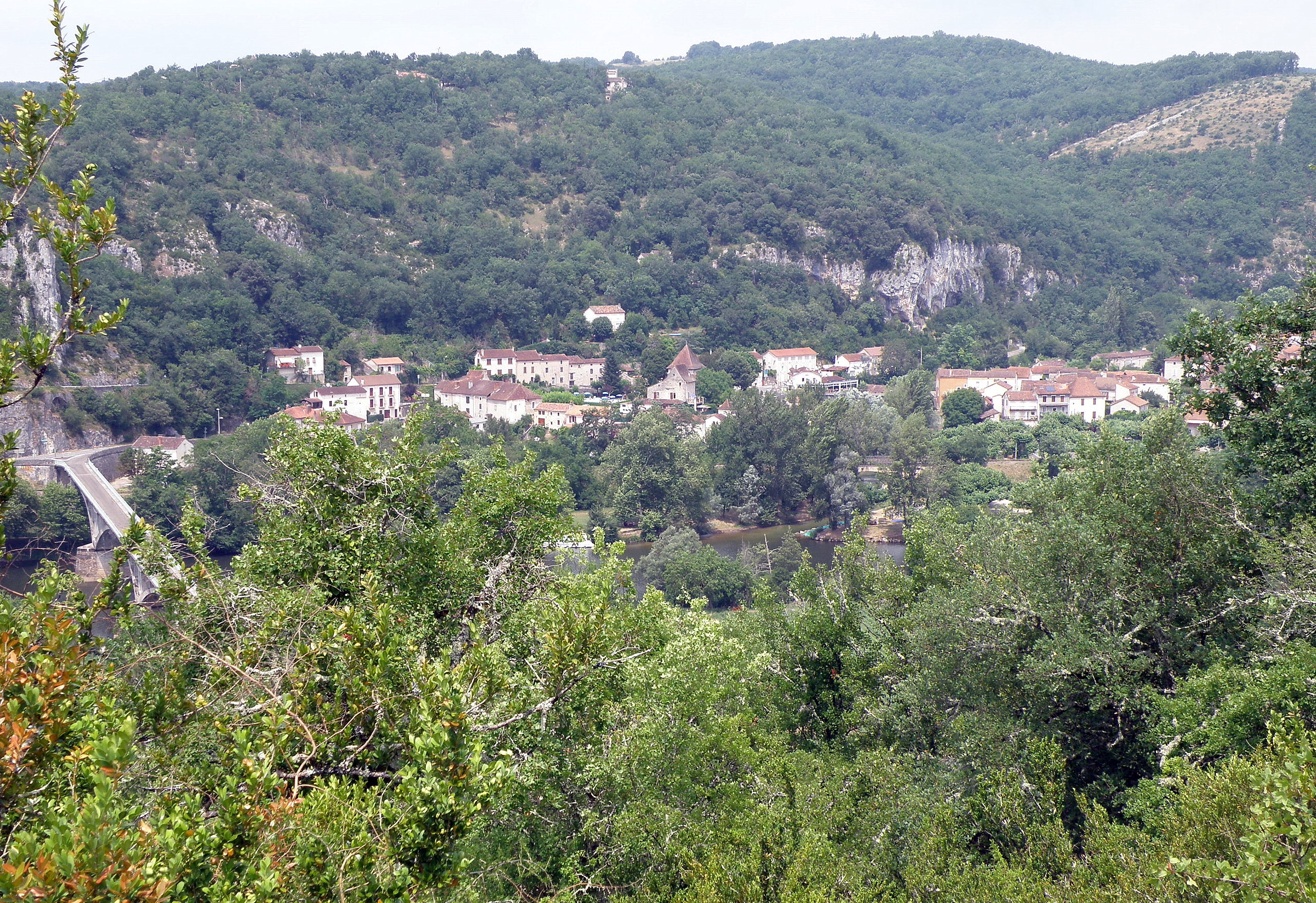 Vers. Vue générale du village prise depuis le sommet de la butte de Béars (comm. d’Arcambal), située à quelque 500m au sud-sud-est de la localité (nous regardons donc vers le nord-nord-ouest). On distingue : - le Lot, visible derrière les frondaisons à l’avant-plan, et le pont le franchissant. Noter au centre de la photo l’embouchure de la rivière Vers dans le Lot ; - un peu à gauche de cette embouchure, la tour carrée et à toit en pavillon, dite tour des Chartreux (XVIe siècle) ; - plus à droite, maisons appartenant au castrum.